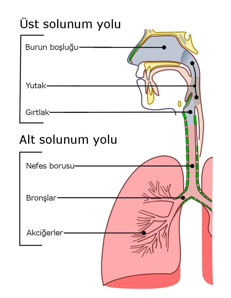 Solunum yolları şeması.